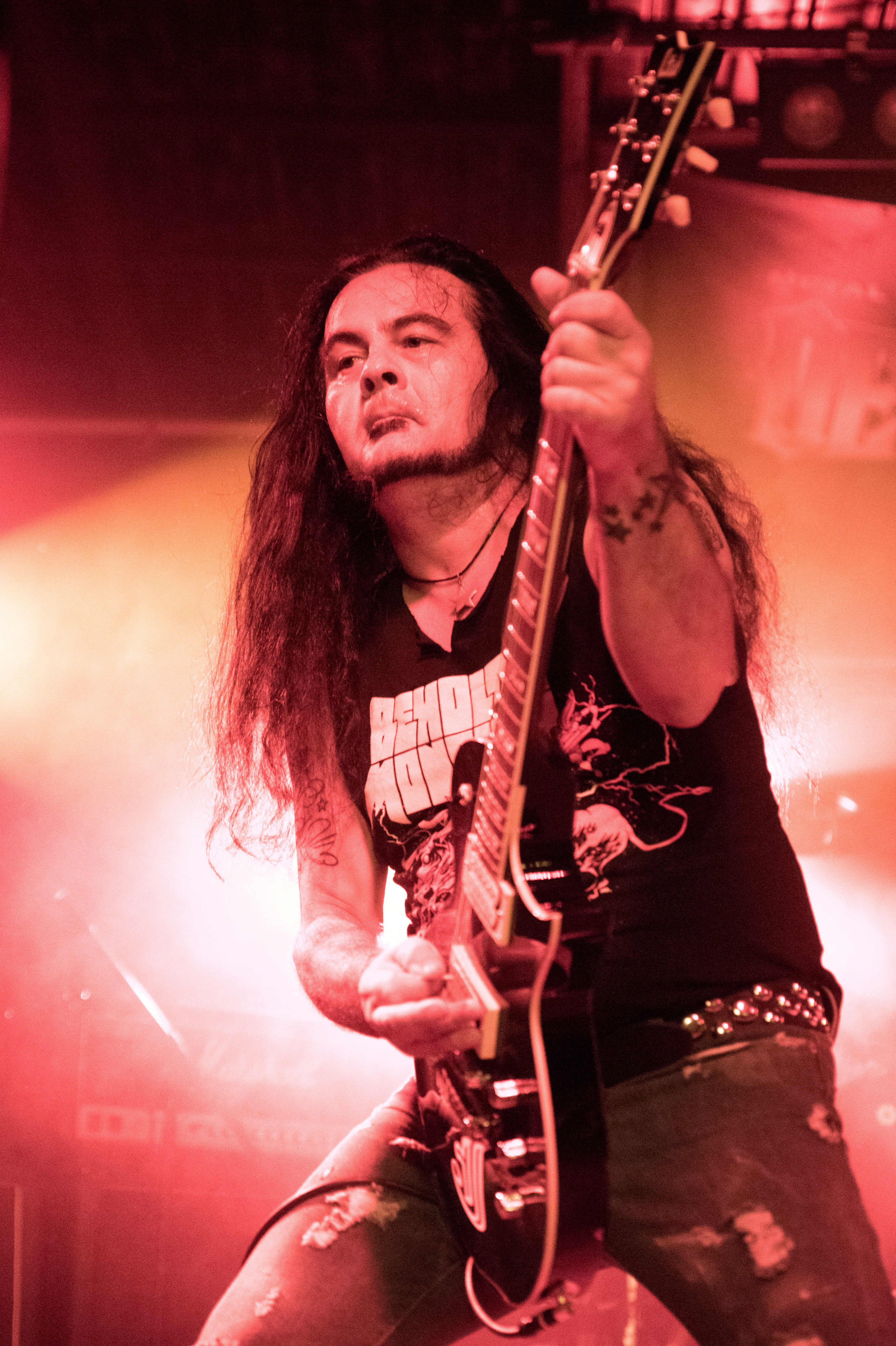 Armored Saint beim Headbangers Open Air 2016